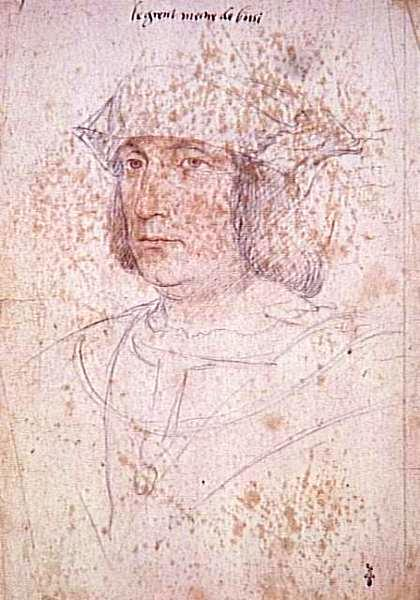 Zeichnung des Artus Gouffier de Boisy (um 1475-1519) aus der Werkstatt von Jean Clouet